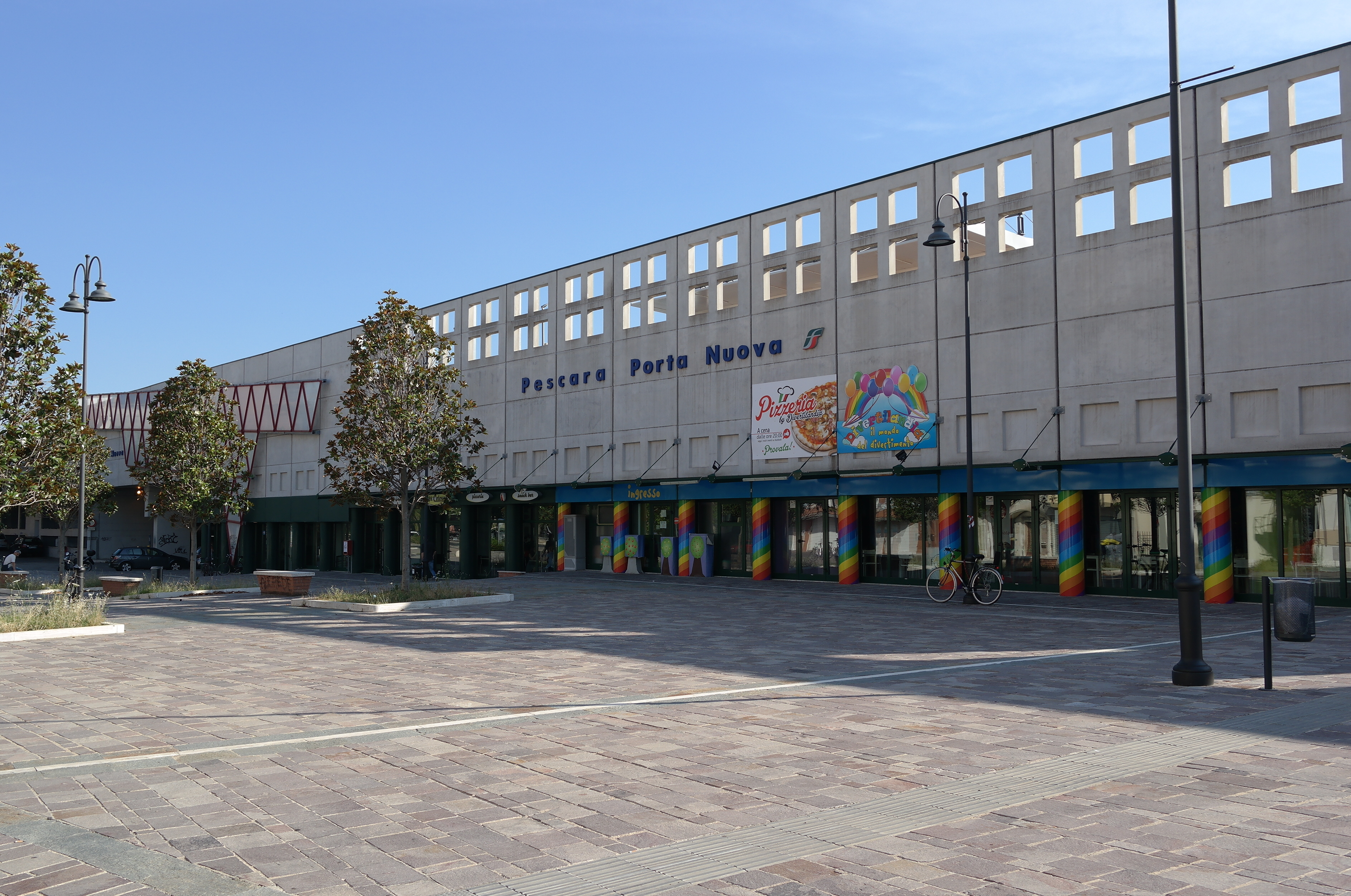 Stazione di pescara Porta Nuova